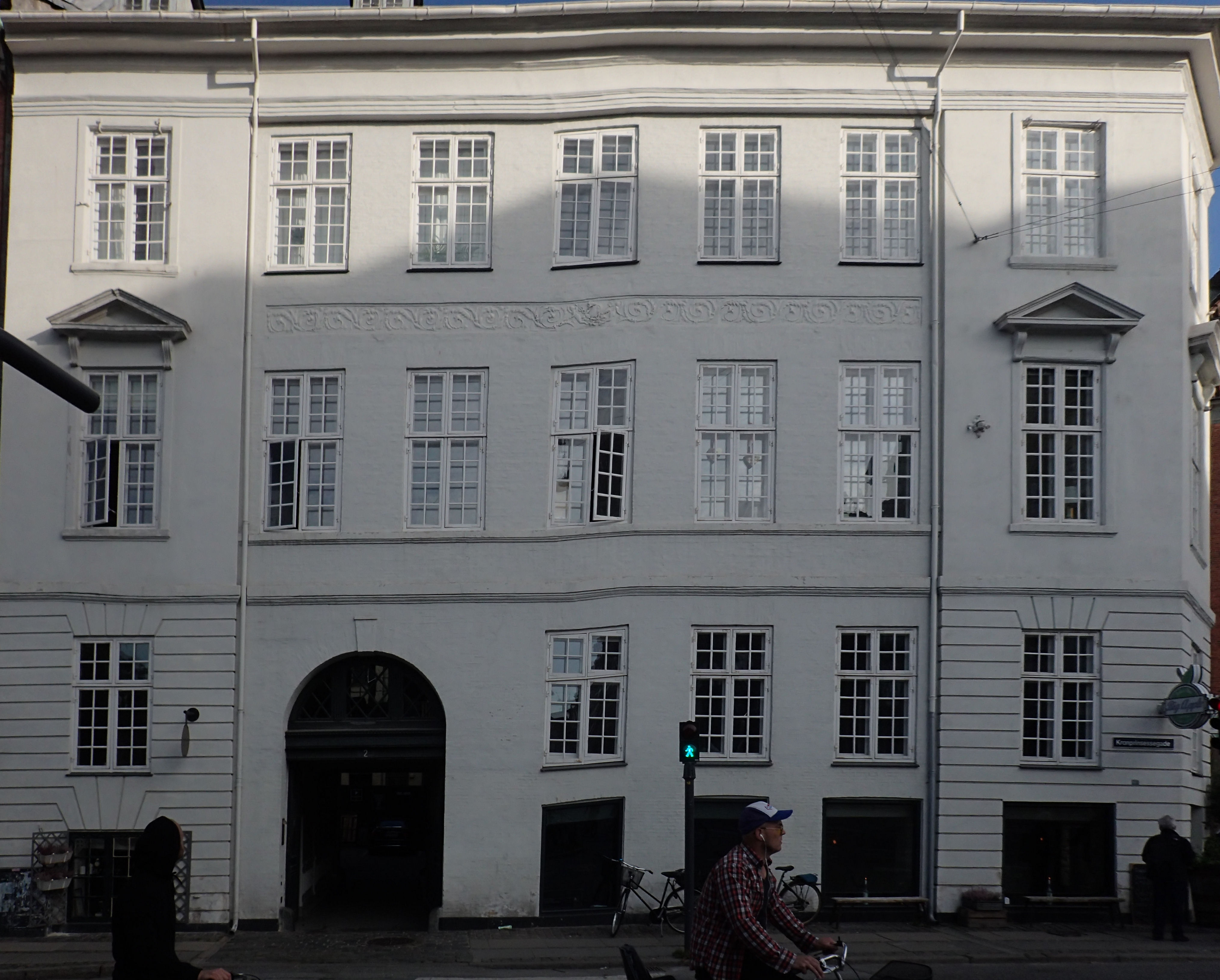 Ejendom i København med sætningsskade, bygget på kanten af gammel voldgrav (Kronprinsessegade 2)